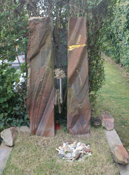 Wilfried Scheib-Friedhof Mauer (47-6-1)